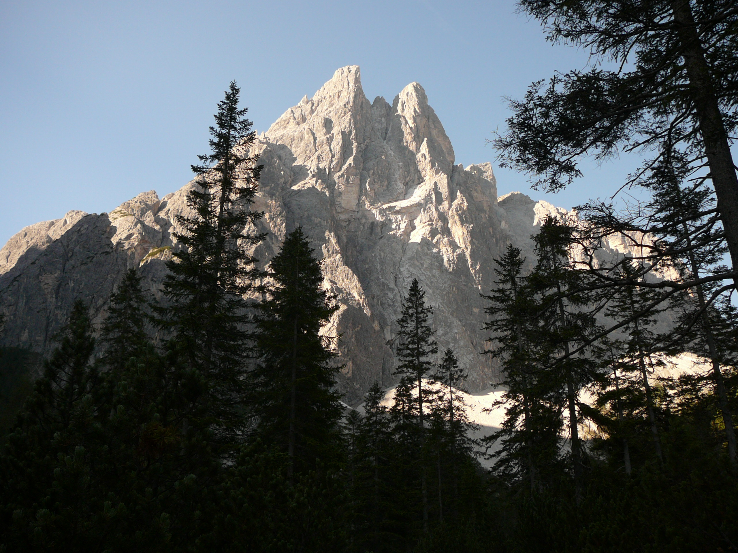 Cima Una